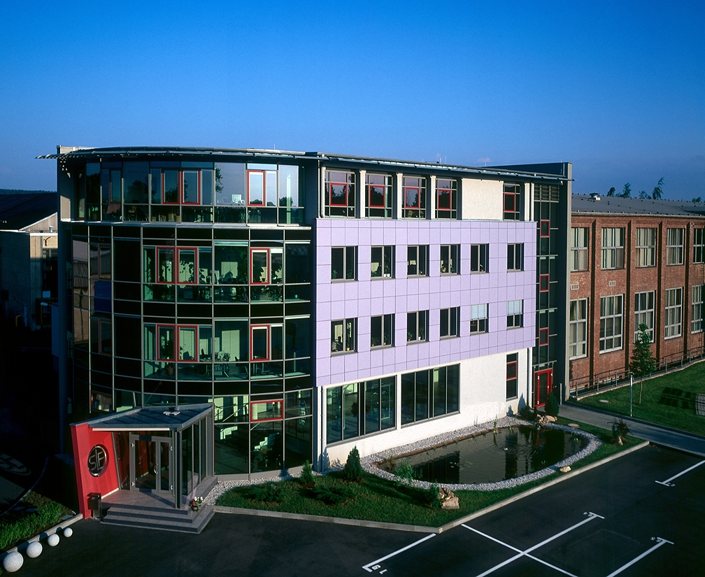 Neues Bürogebäude I der Spindel- und Lagerungstechnik Fraureuth GmbH